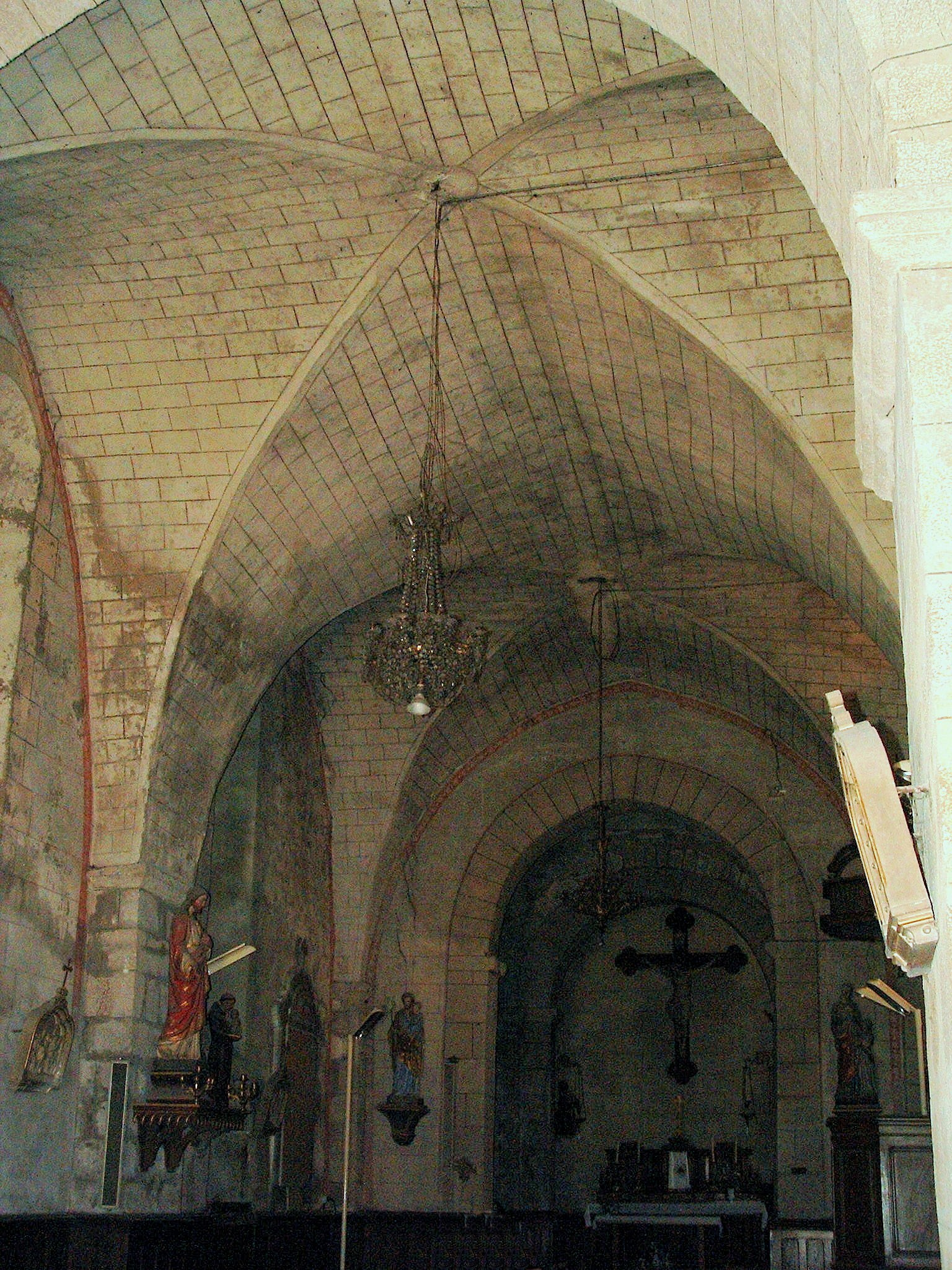 Le Vigen - Eglise Saint-Mathurin - Nef